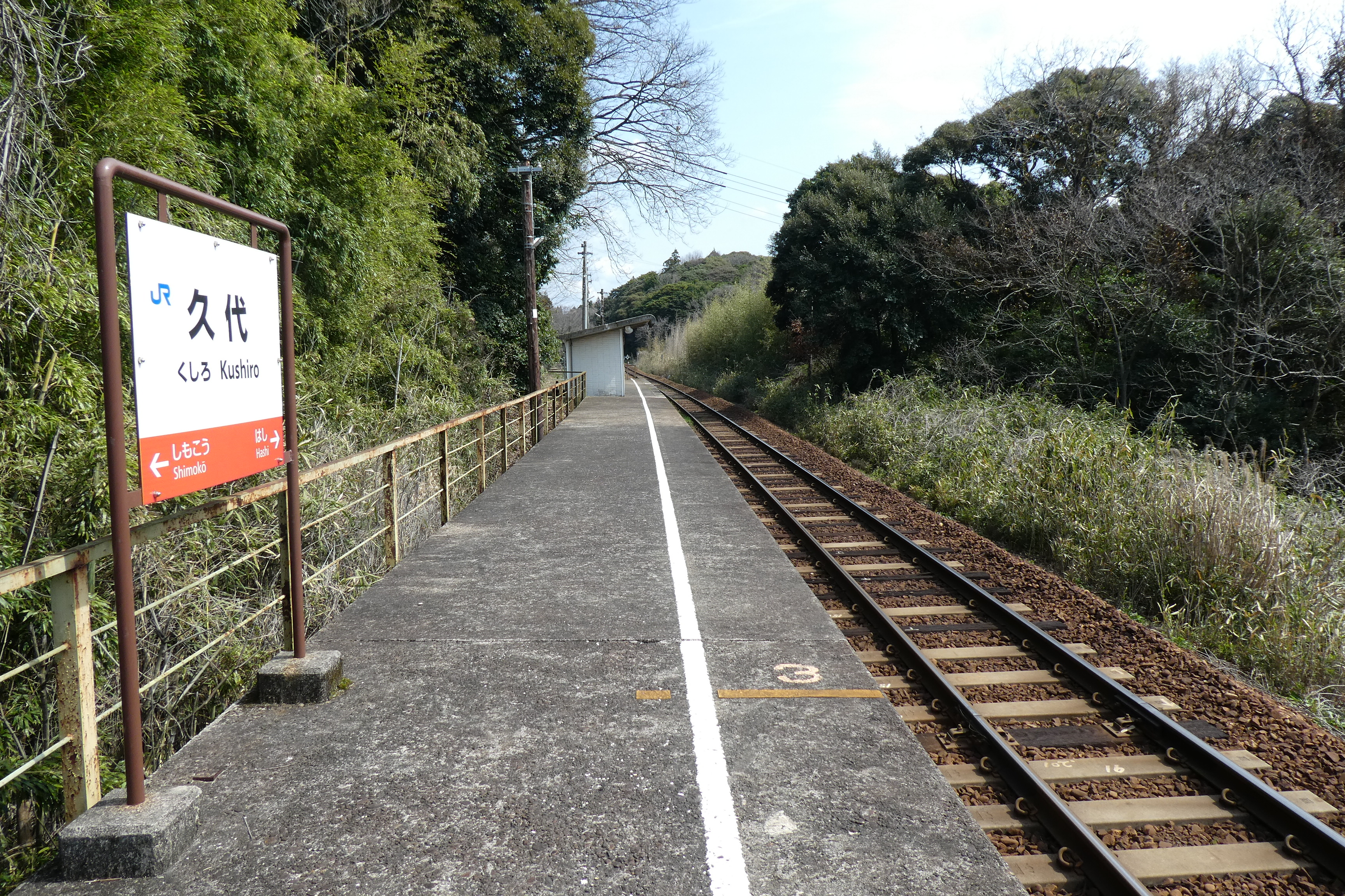 山陰本線久代駅プラットホーム